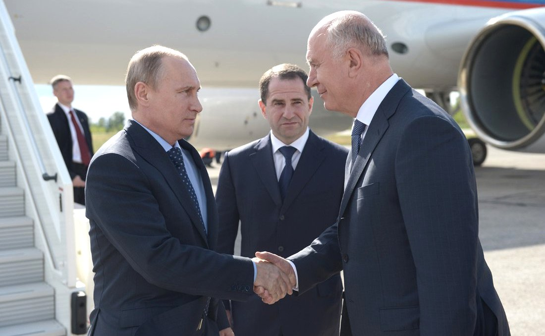 Поездка Президента России Владимира Путина в Самарскую область. С полномочным представителем Президента в Приволжском федеральном округе Михаилом Бабичем и временно исполняющим обязанности губернатора Самарской области Николаем Меркушкиным